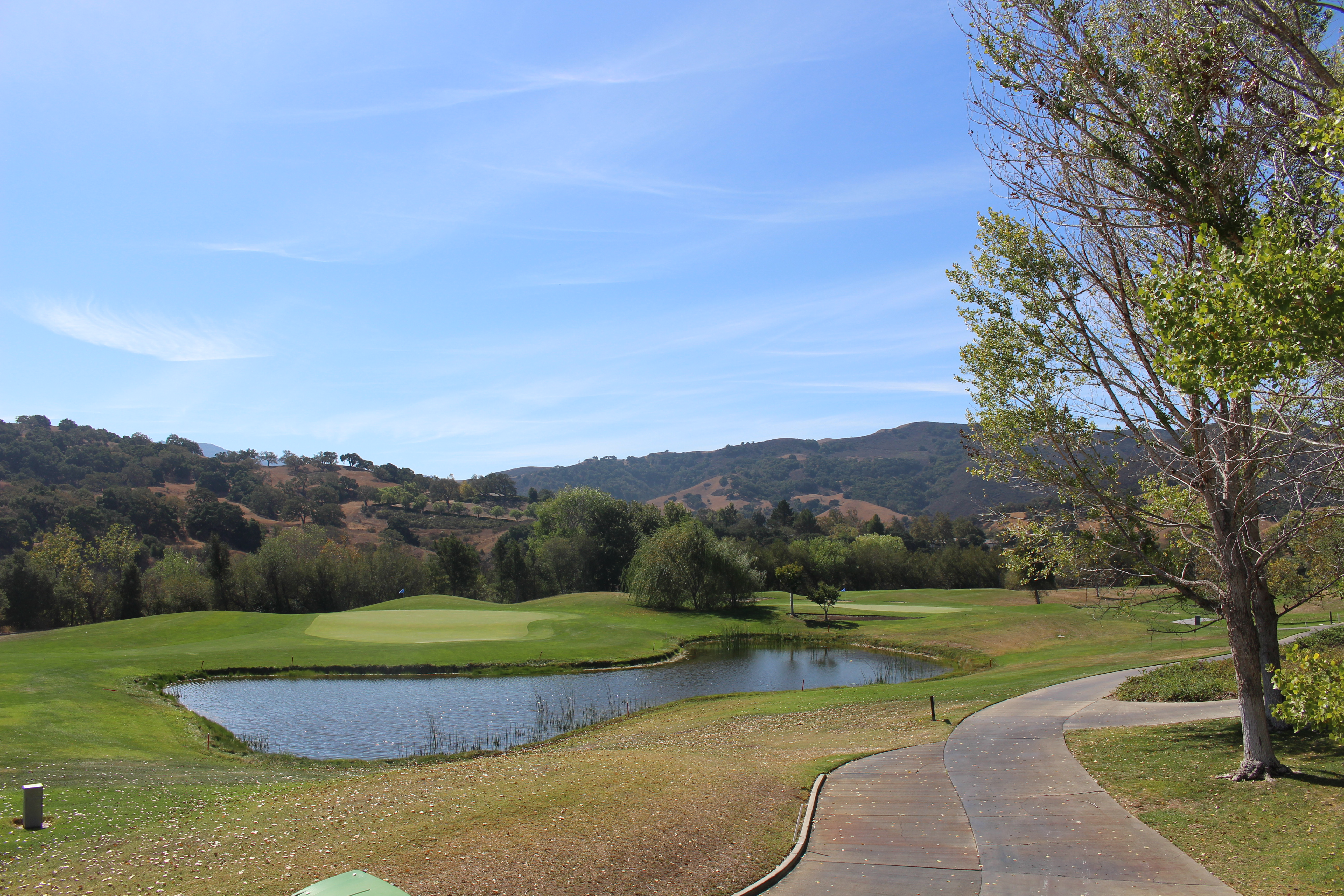 Shot at Solvang Golf course in 2014